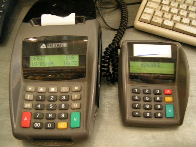 Terminal de paiement électronique Modèle : Ingenico Elite 510 - 8 bit ( Le SN commence par E0510......., par exemple e0510TLC012c )